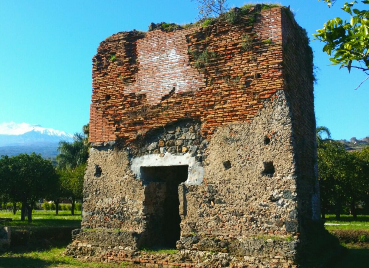 Torre Rossa - Foto di Alessandro Lo Piccolo